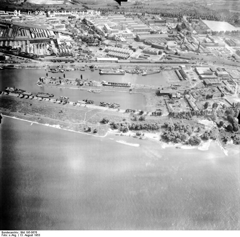 Rheinbefliegung der Alliierten 1953 Information added by Wikimedia users.